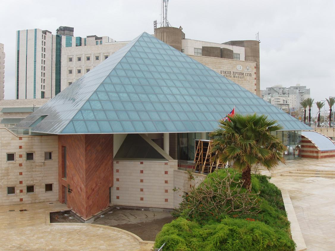 פירמידת זכוכית, מרכז אמנויות מונארט, אשדוד. צילם דוד שי.